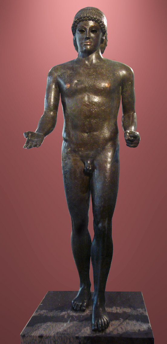 Apolo de Piombino, bronze, detalhes em cobre, autor desconhecido, datação incerta, possivelmente século I a.C.